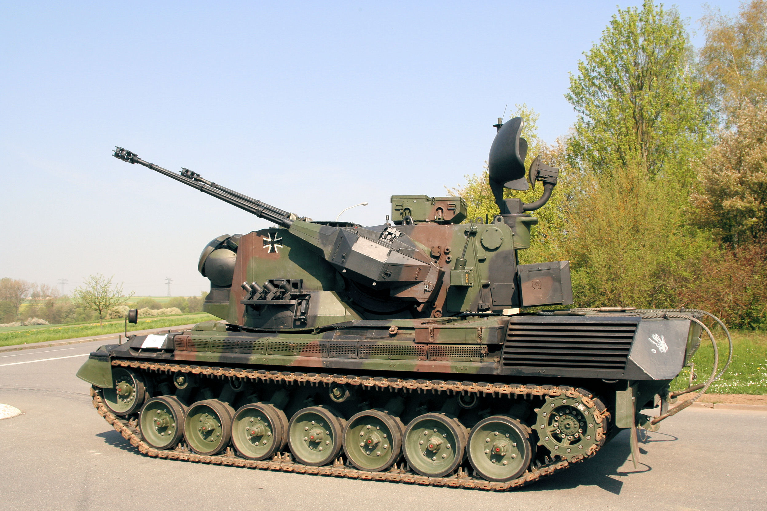 Gepard 1A2 Seitenansicht, Gepard 1A2 side view